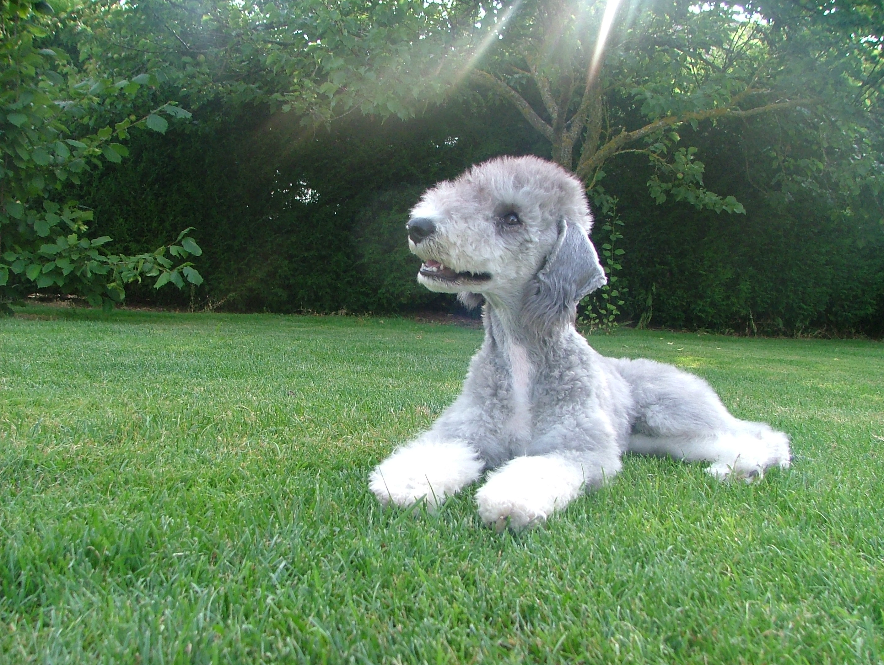 Diego, un Bedlington Terrier en juillet 2009.